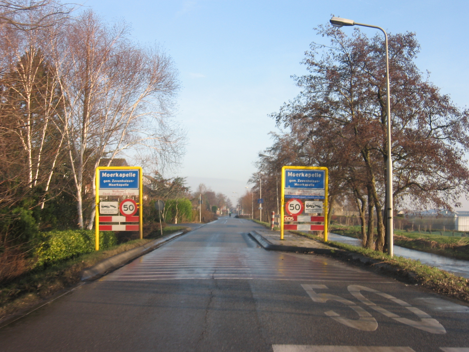 Moerkapelle